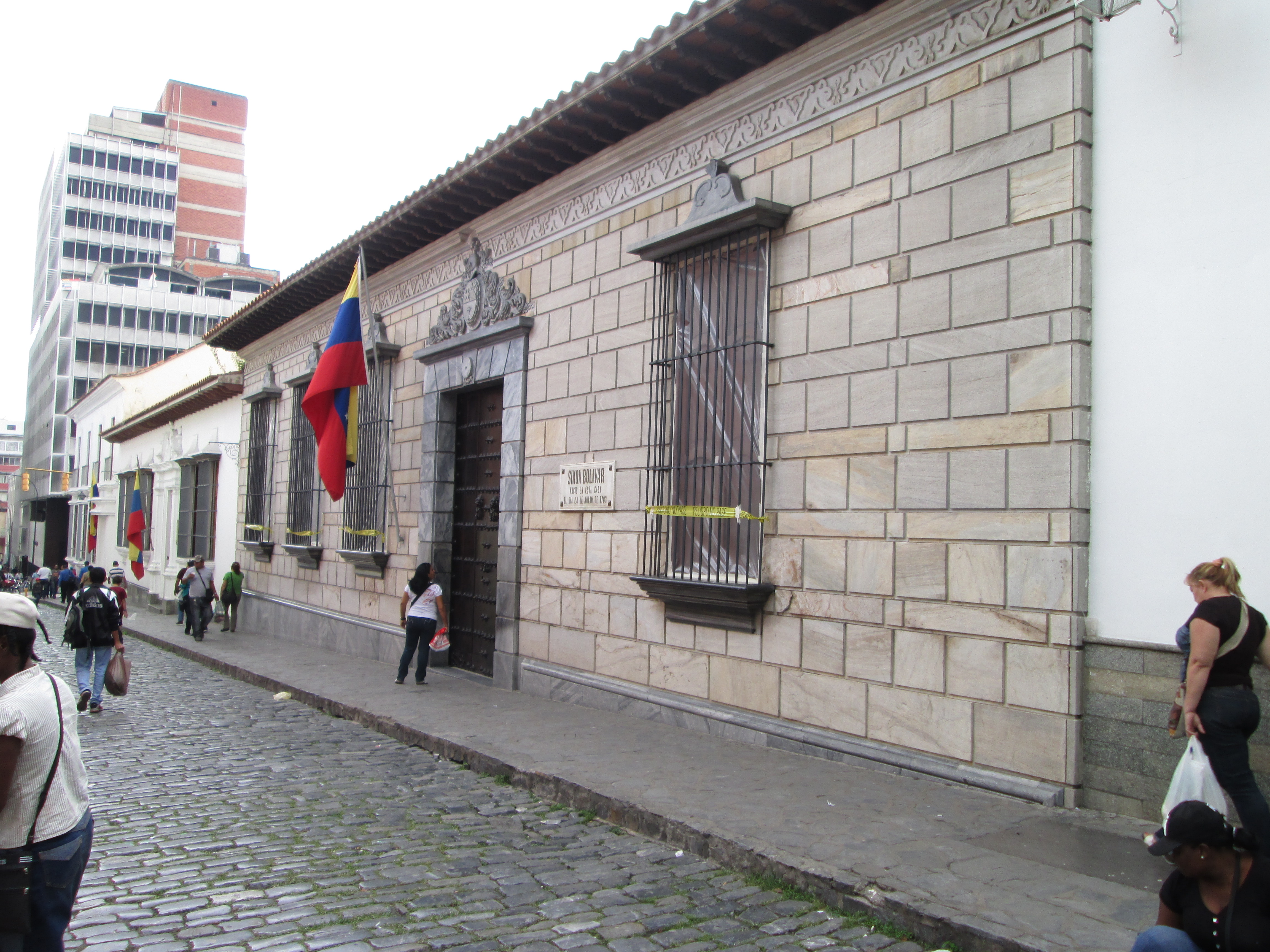 Fachada de La Casa Natal de Simón Bolívar en el Centro de Caracas